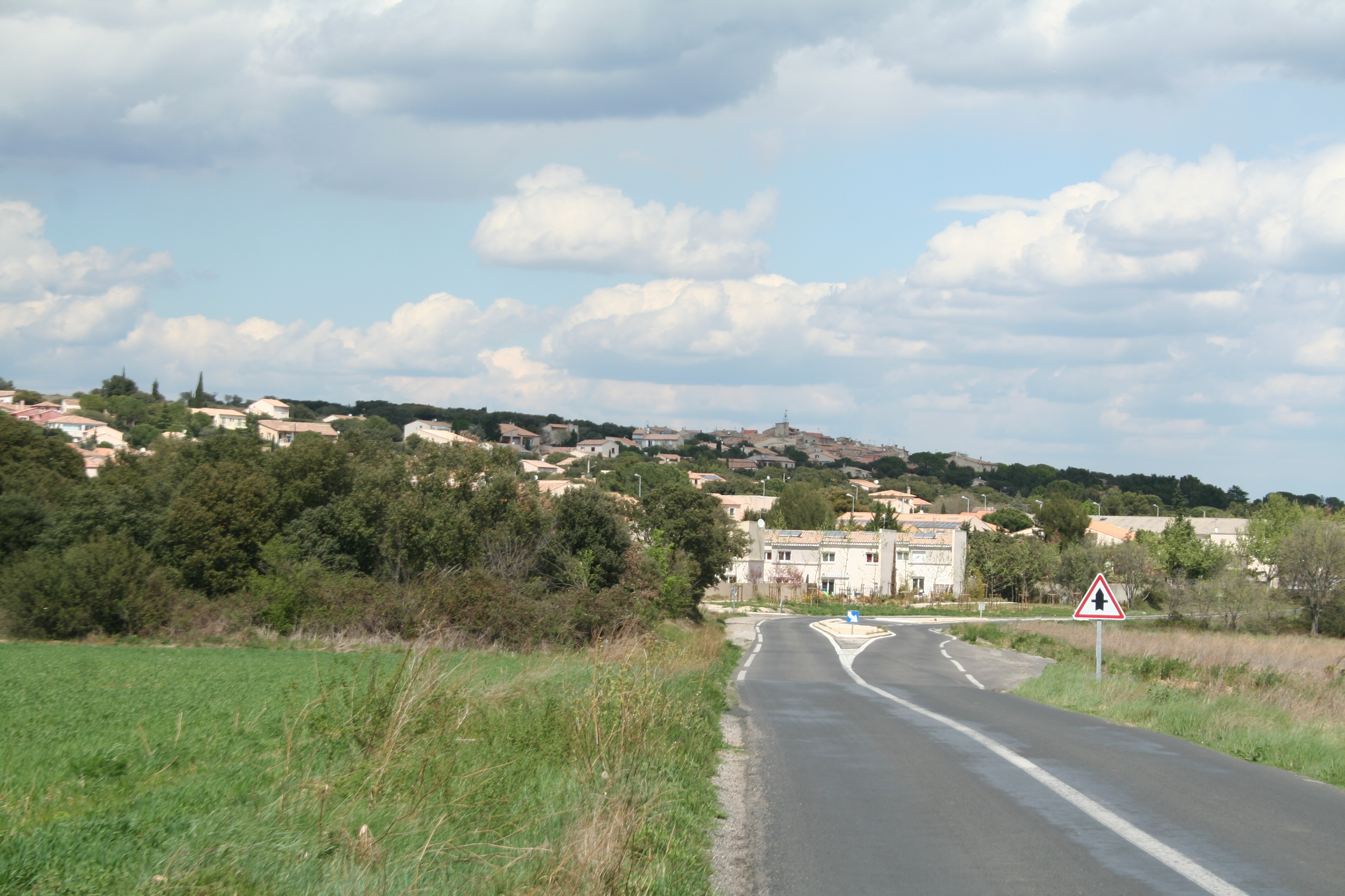 Cournonsec (Hérault) - vue générale.